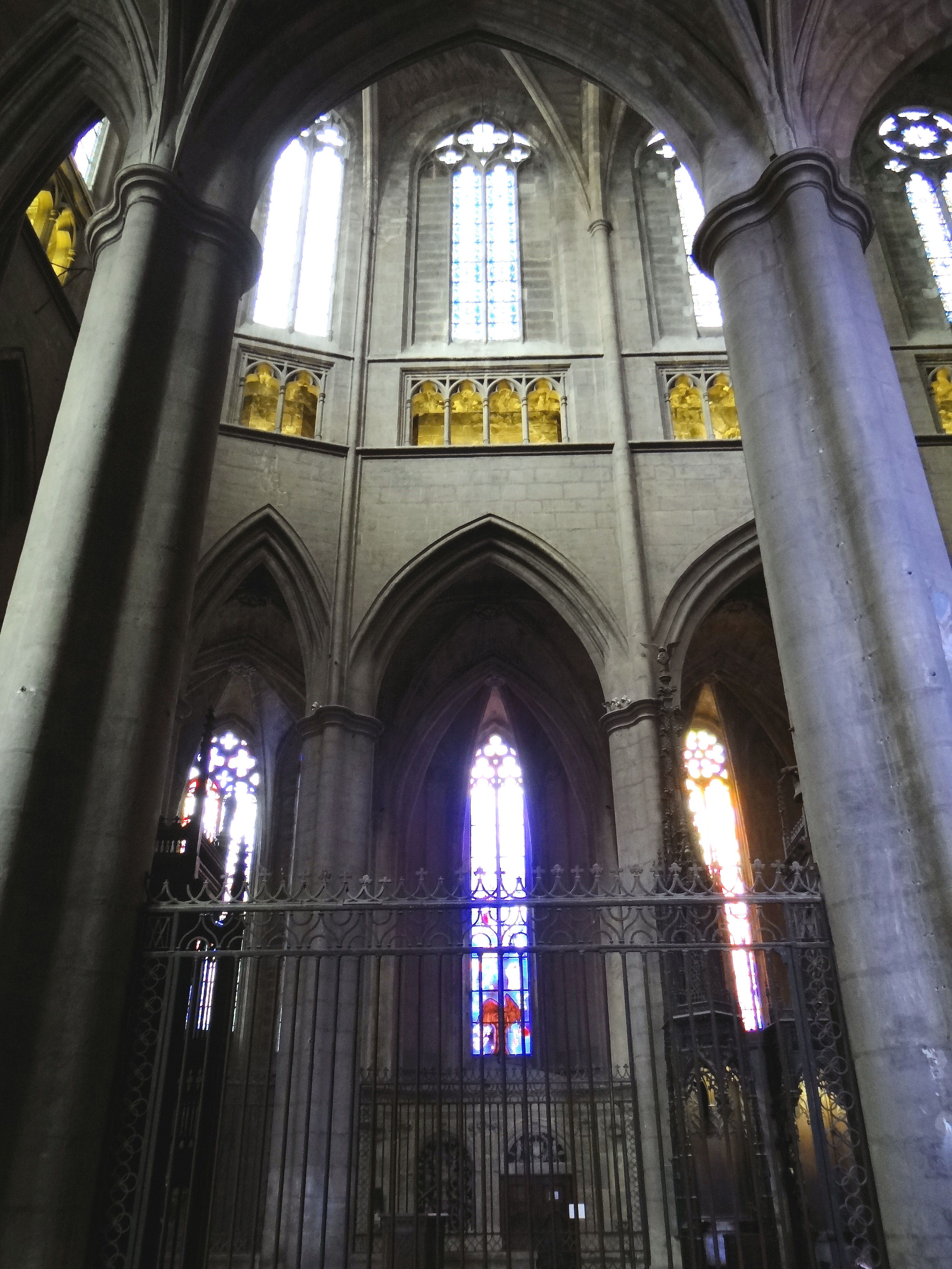 Rodez - Cathédrale Notre-Dame - Elévation du choeur